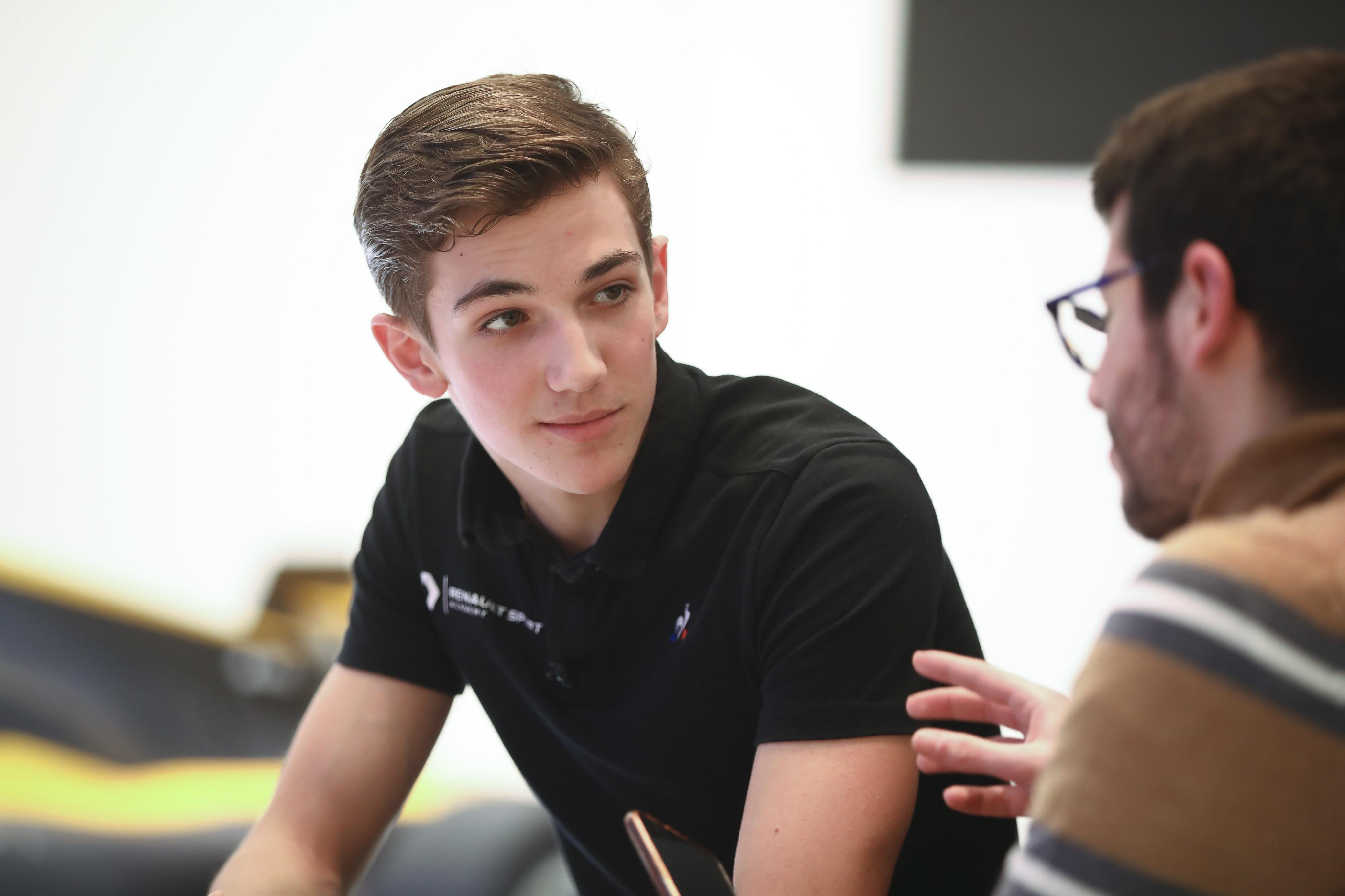 Photographie d'Hadrien David à l'Atelier Renault.